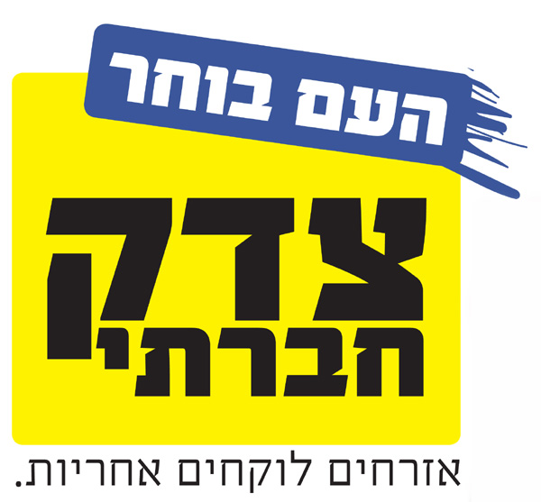 סמל מפלגת צדק חברתי